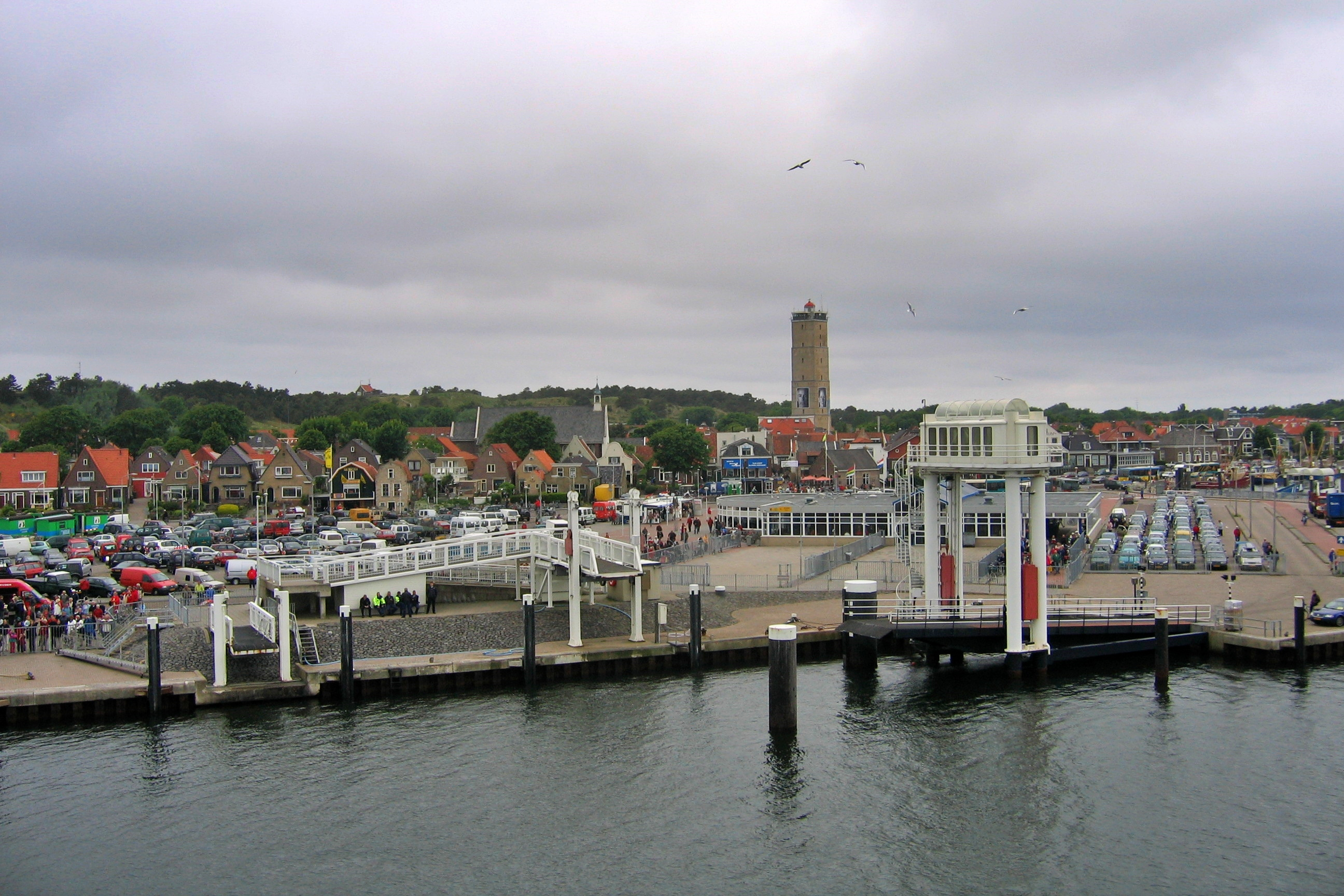 West - Terschelling vanaf de boot